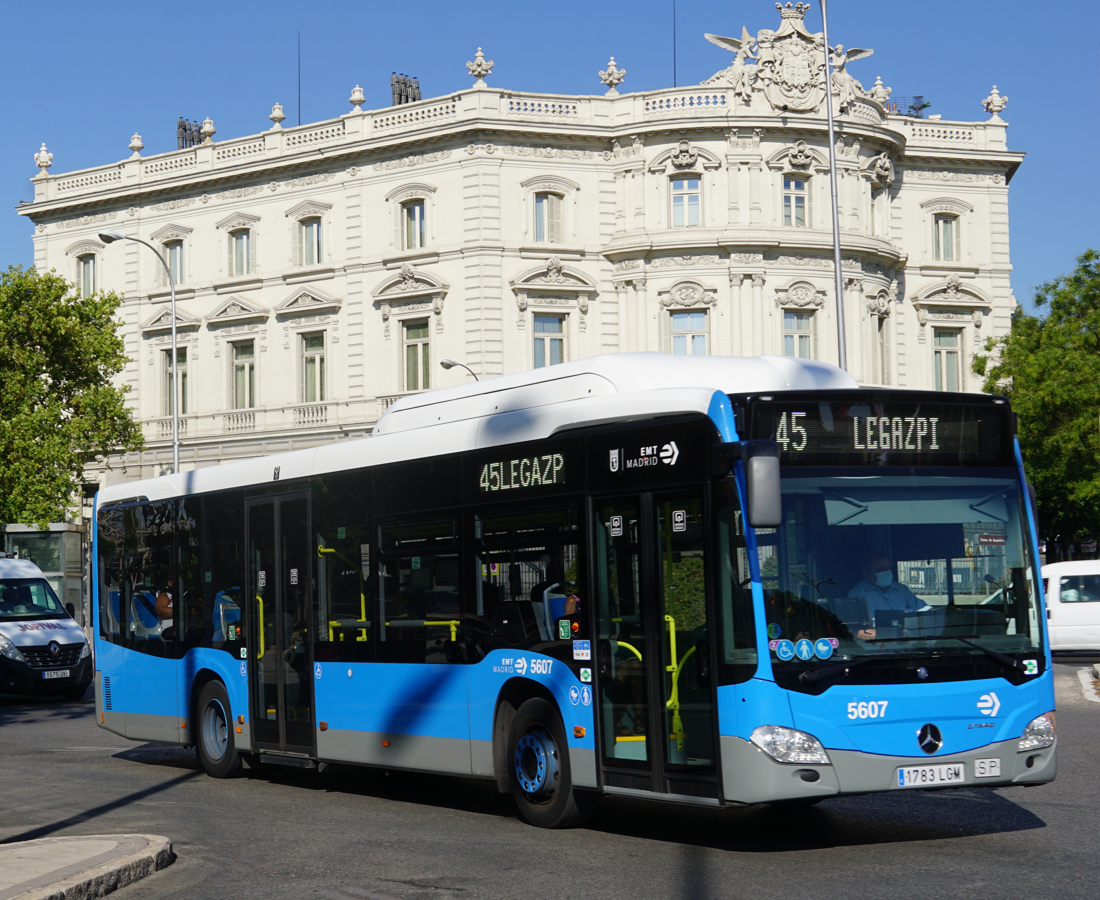 45 EMT Madrid en la Plaza de la Cibeles, agosto 2020